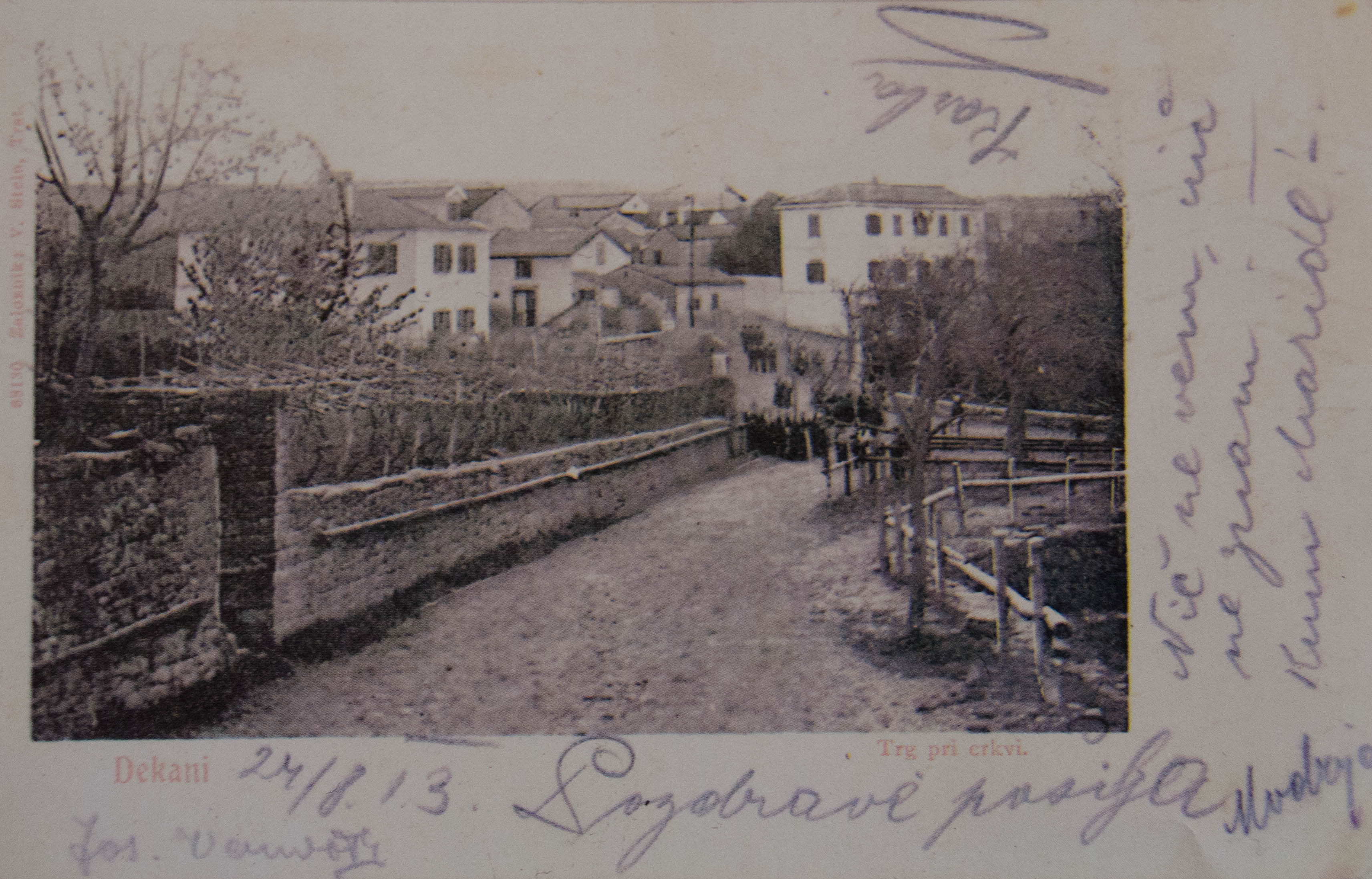 Razglednica Dekanov.